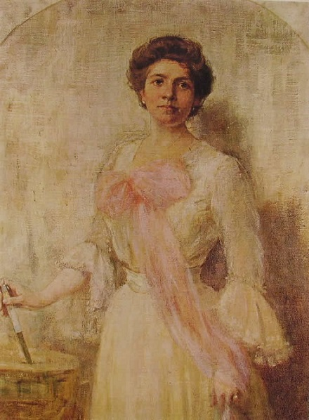 La contessa Paolina Giustiniani Toso, olio su tela, 102 x 85 cm, collezione privata, Venezia